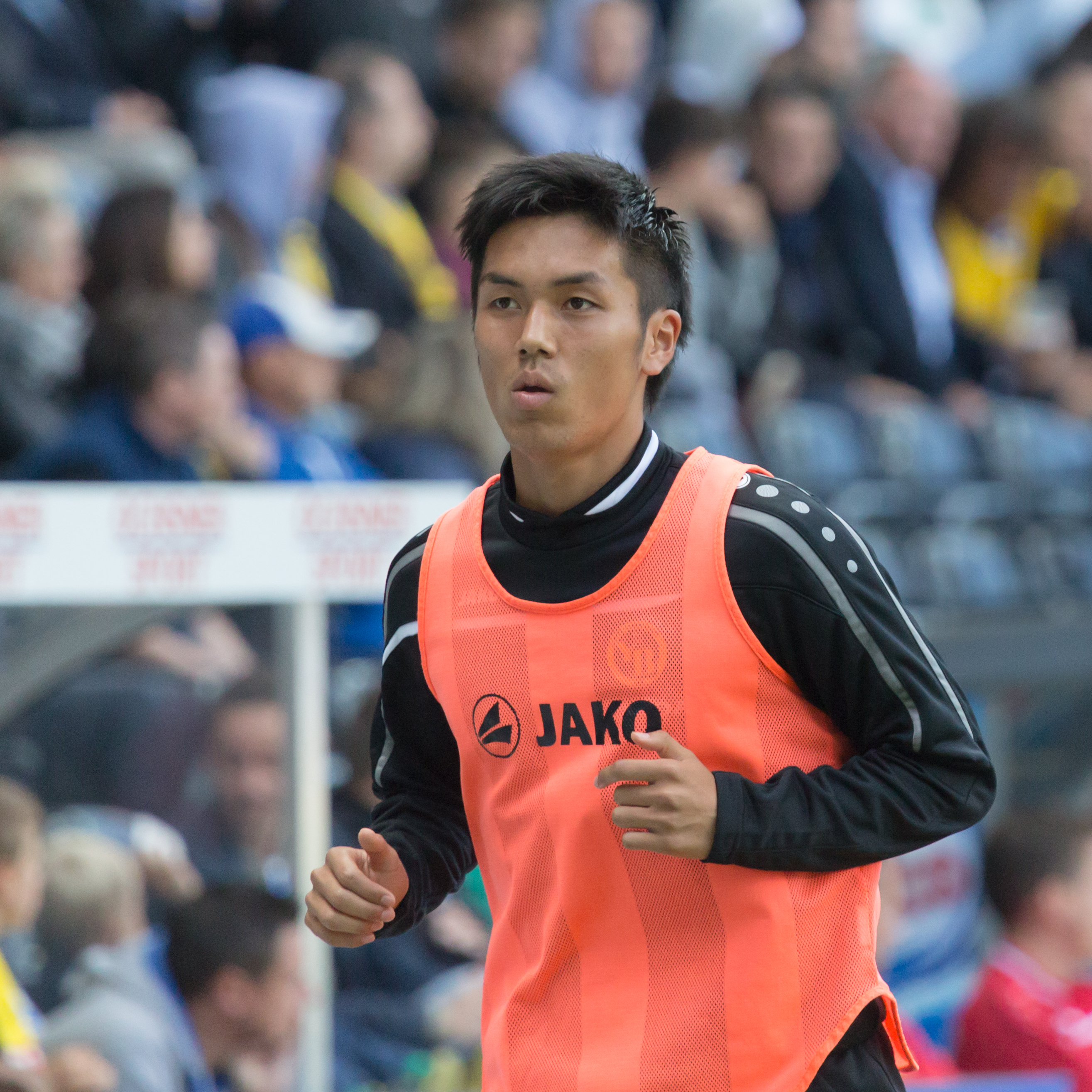 Yūya Kubo beim Spiel des BSC Young Boys gegen den FC Luzern